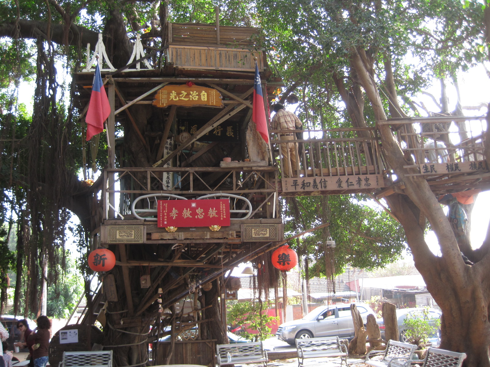 二空新村圓夢樹屋